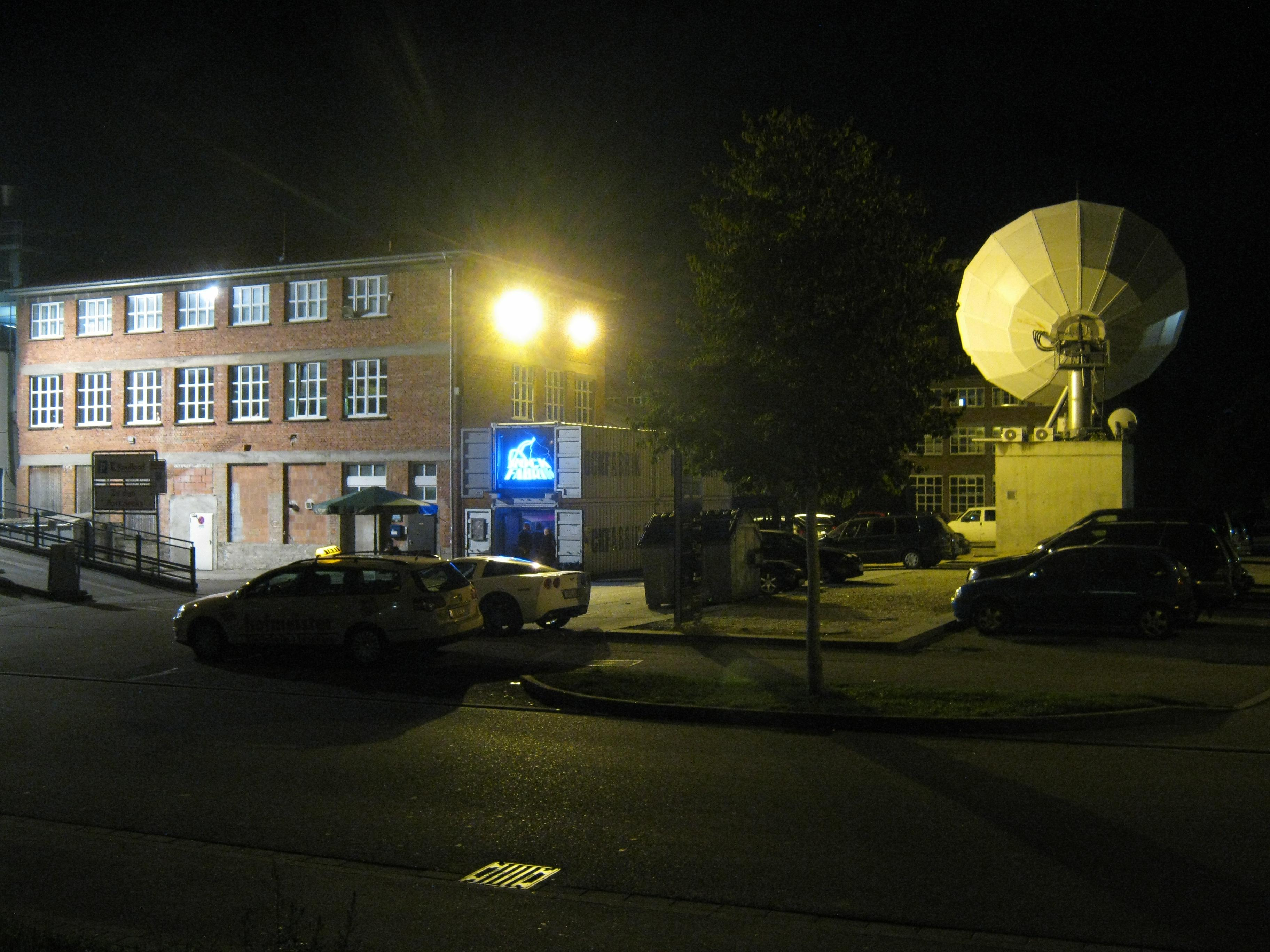 Diskothek Rockfabrik in Ludwigsburg am Morgen des 29. August 2010.